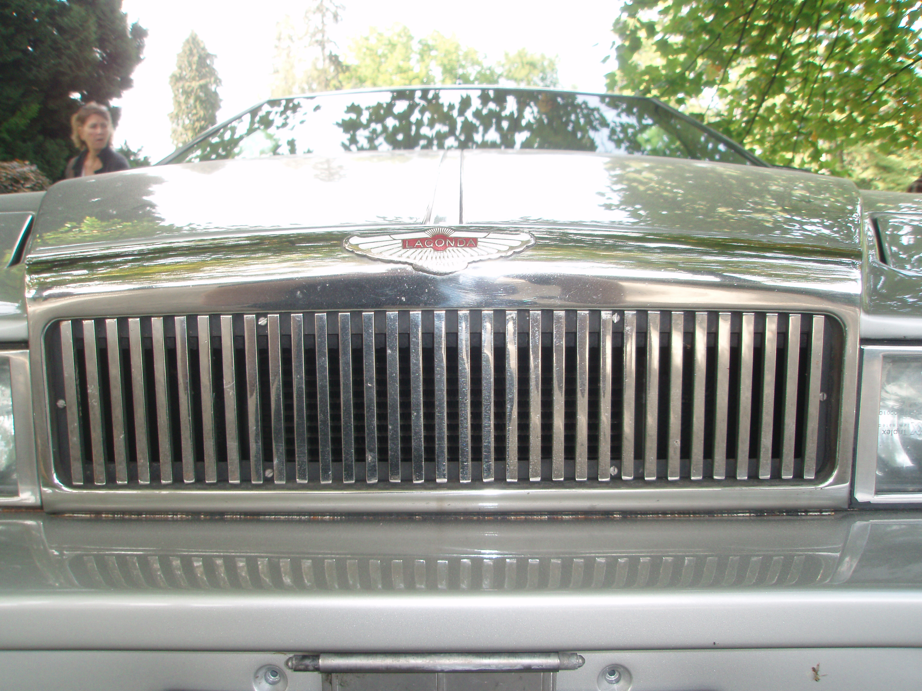 Aston-Martin Lagonda radiator grille